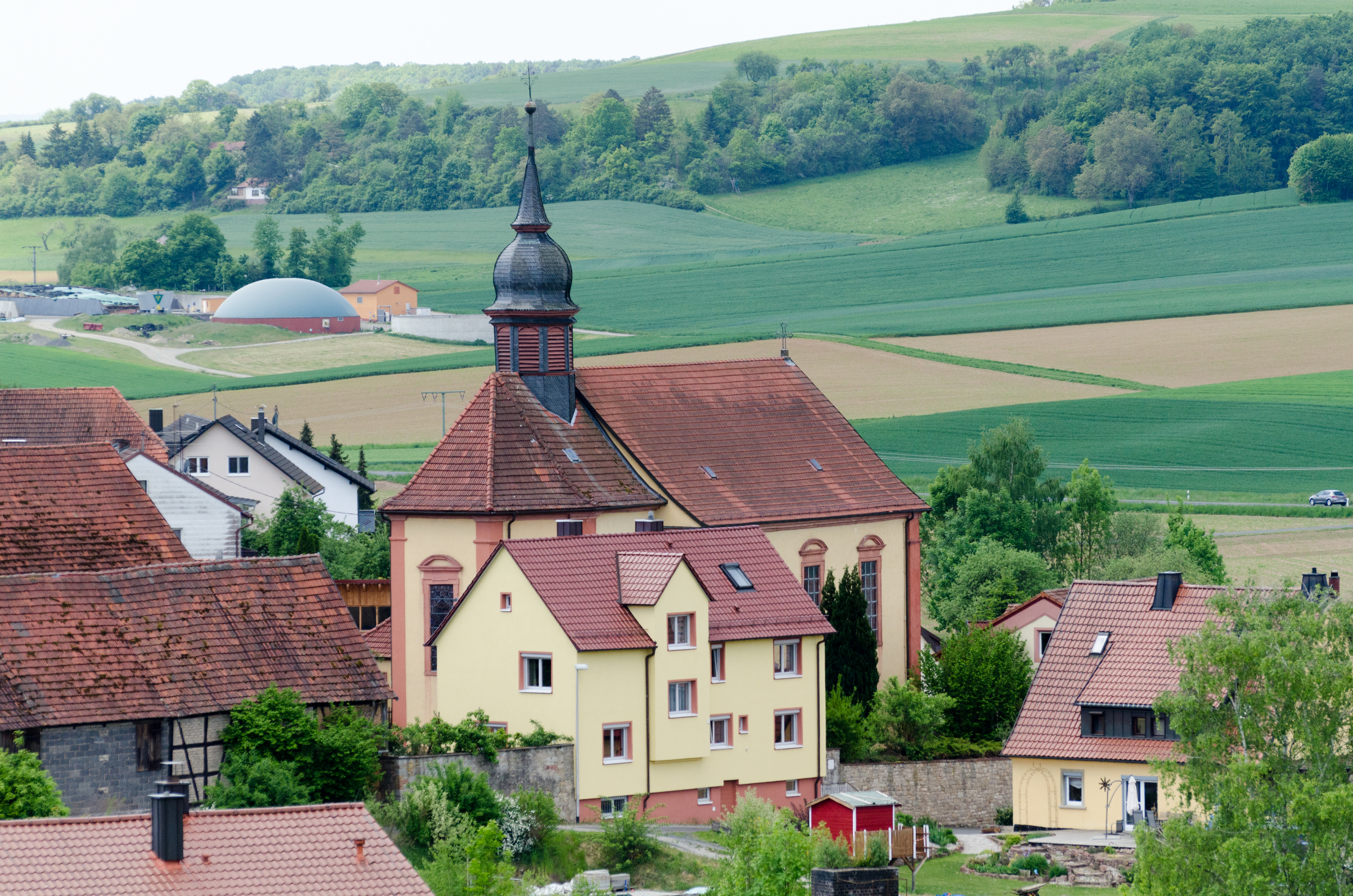 Karsbach, Höllrich, Bonnländer Straße 35, Ev. Pfarrkirche